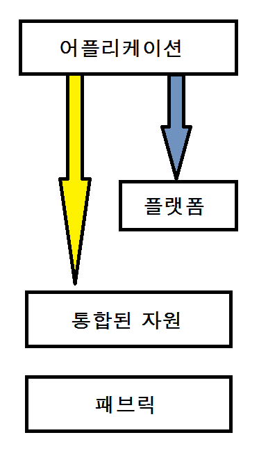 클라우드 아키텍쳐